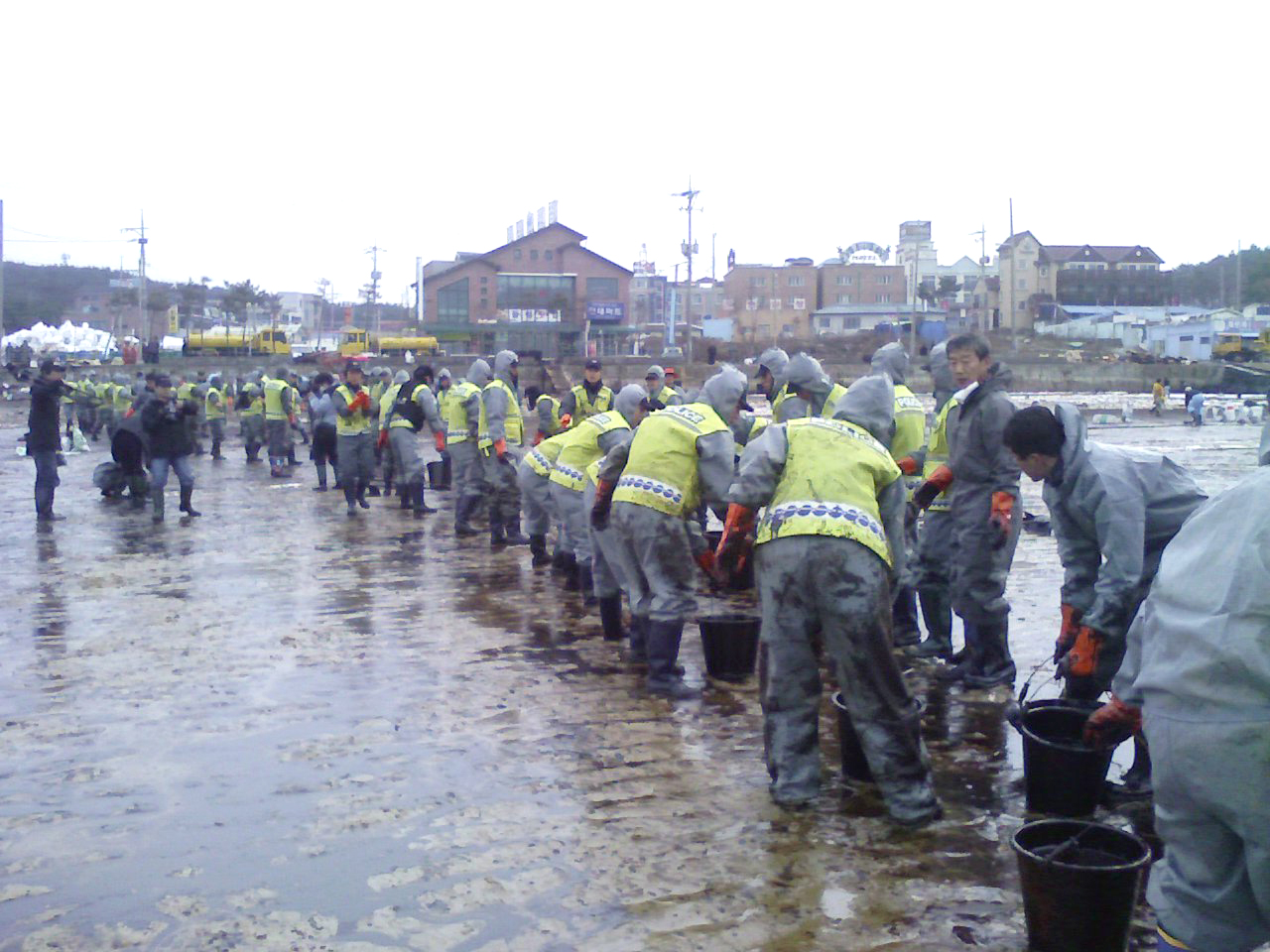 태안 원유 유출 사고 후 만리포 해수욕장. 전경들이 수거된 기름을 옮기는 중.